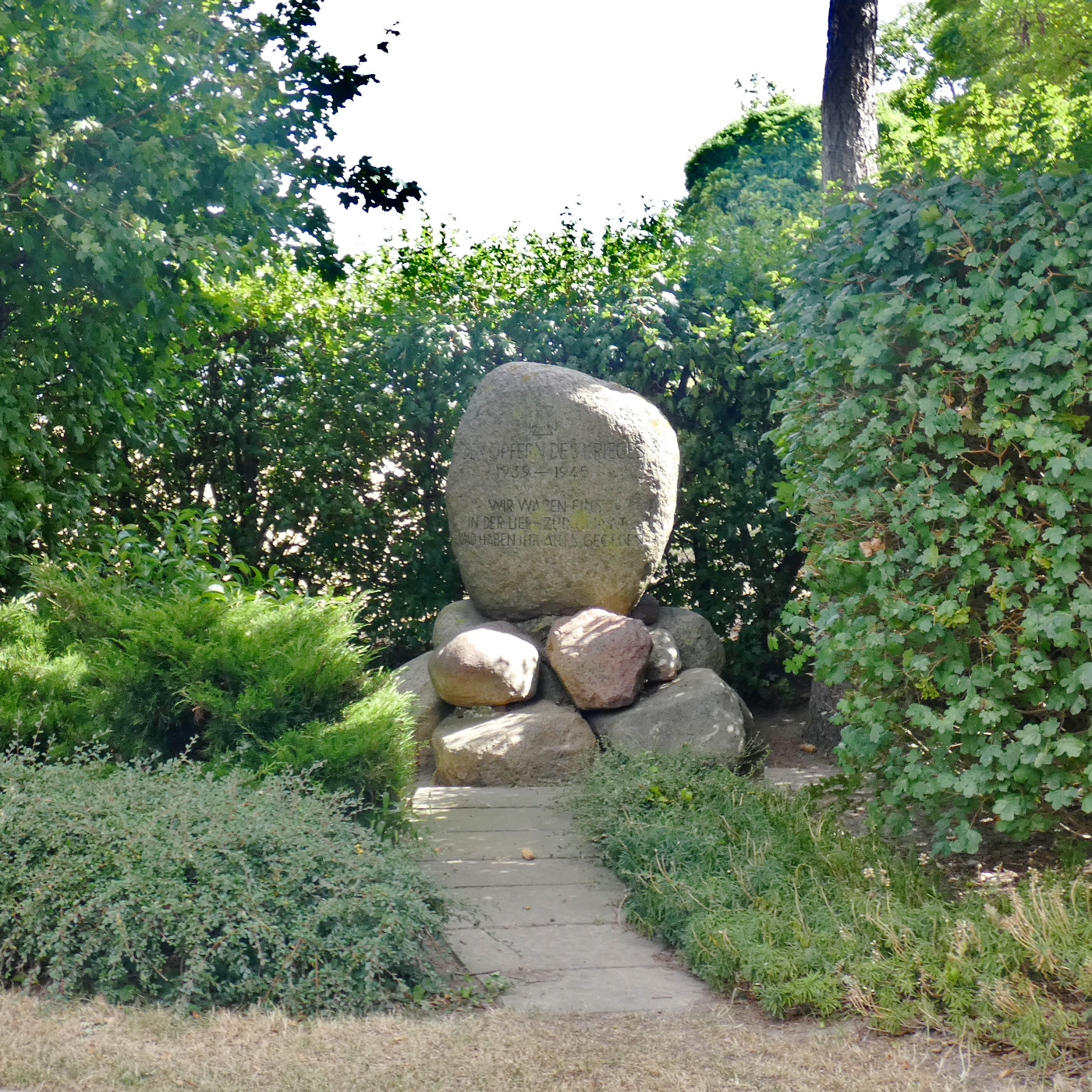 1953 eingeweihtes Denkmal. Anlage um einen Findling.